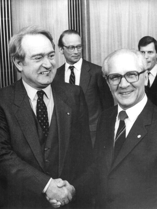 ADN-ZB Link-11.1.85-mb Berlin: Der Generalsekretär des ZK der SED und Vorsitzende des Staatsrates der DDR, Erich Honecker, empfing den Ministerpräsidenten des BRD-Bundeslandes Nordrhein-Westfalen, Johannes Rau, der sich zu einem Informationsbesuch in der DDR aufhält.